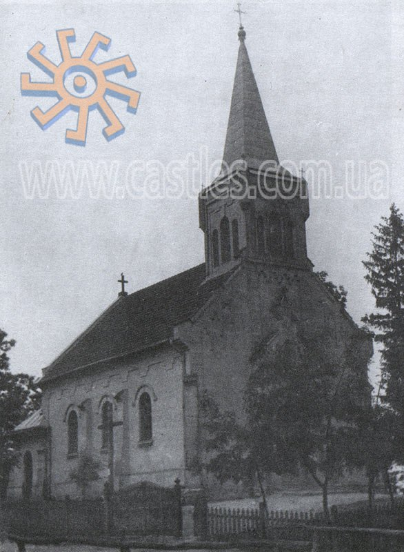 Костел в Медусі коло Галича до совітів